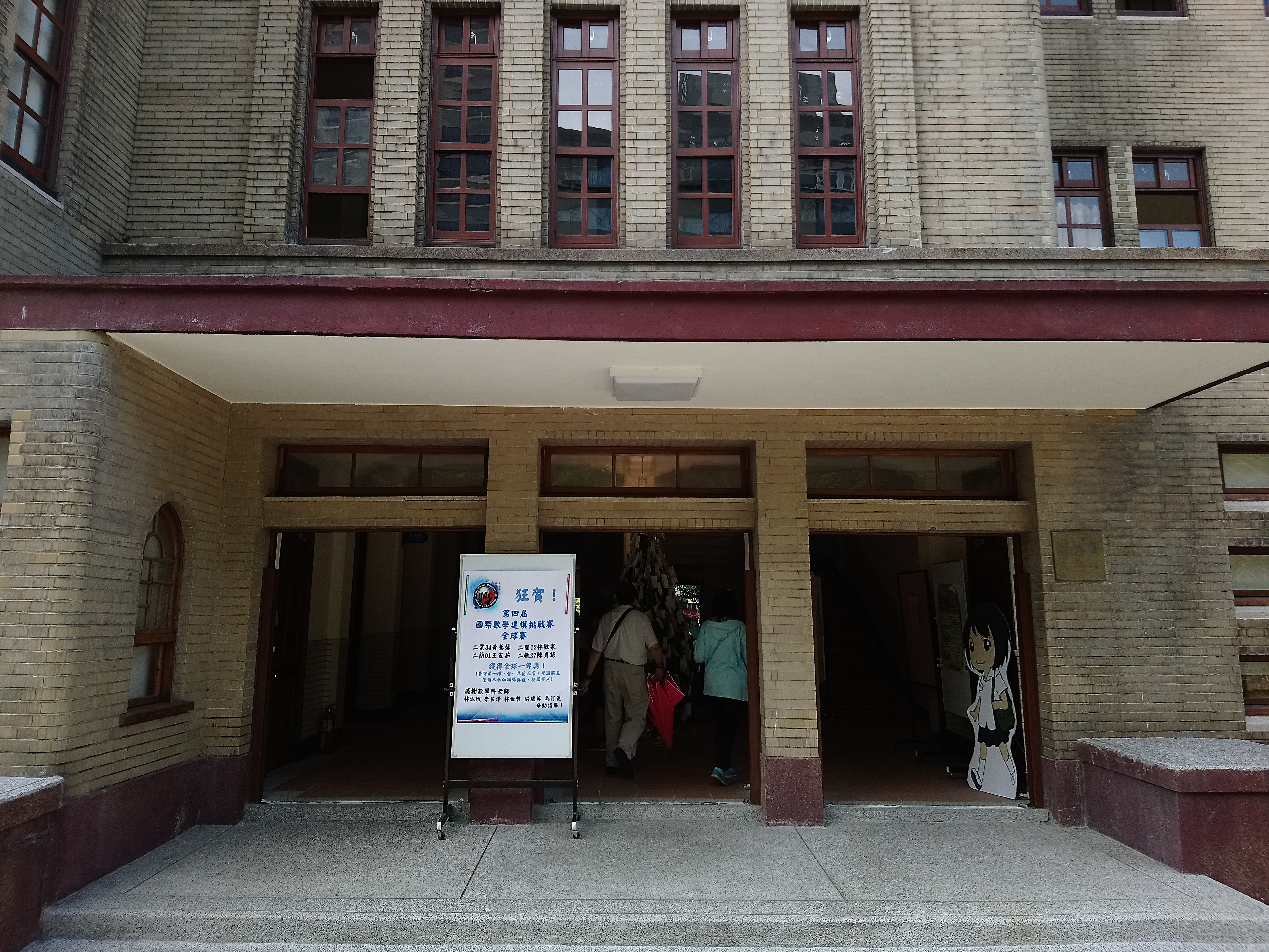 臺北市立中山女子高級中學逸仙樓入口,臺北市中山區朱厝崙次分區力行里